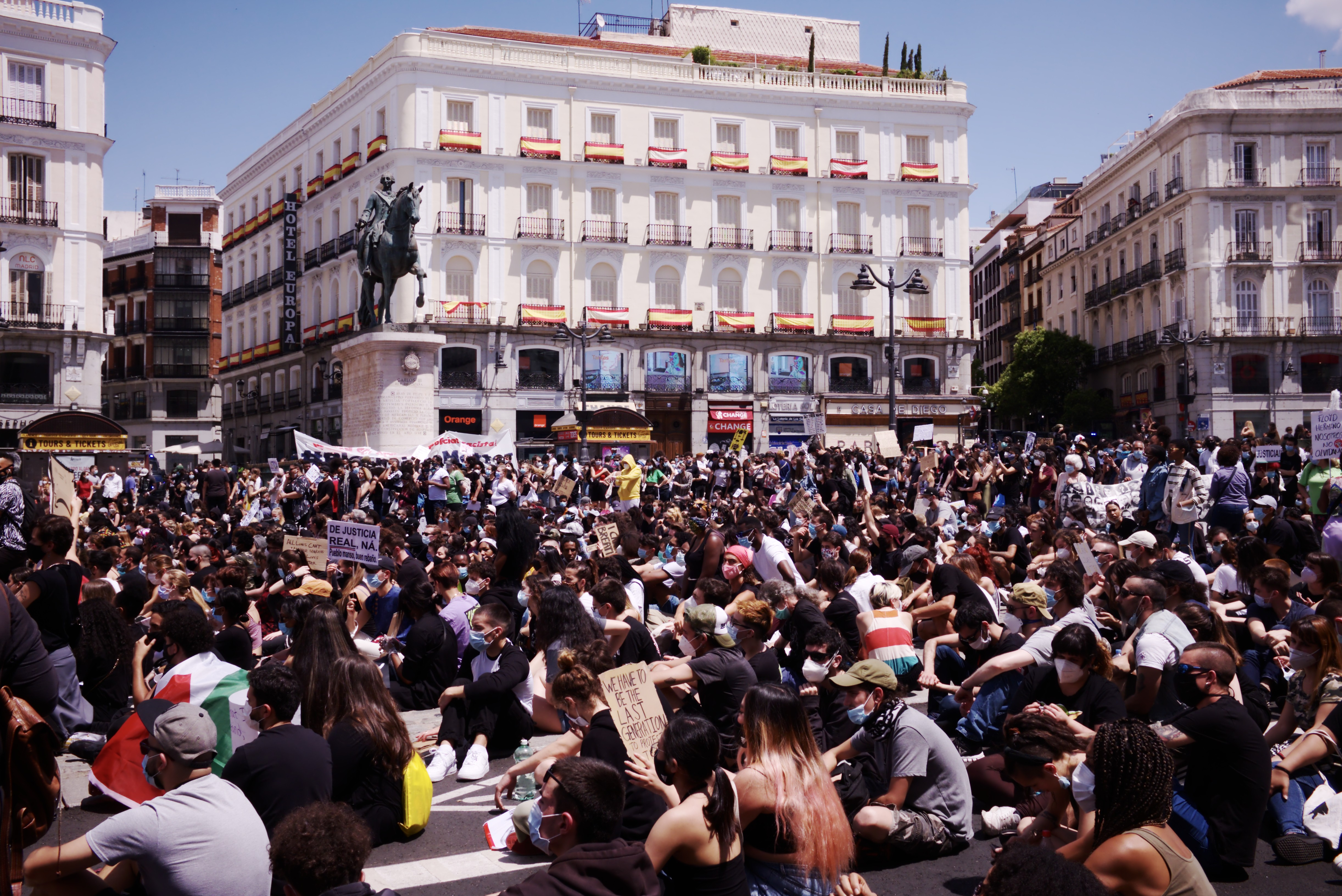 Manifestación contra el racismo en Madrid, 2020-06-07